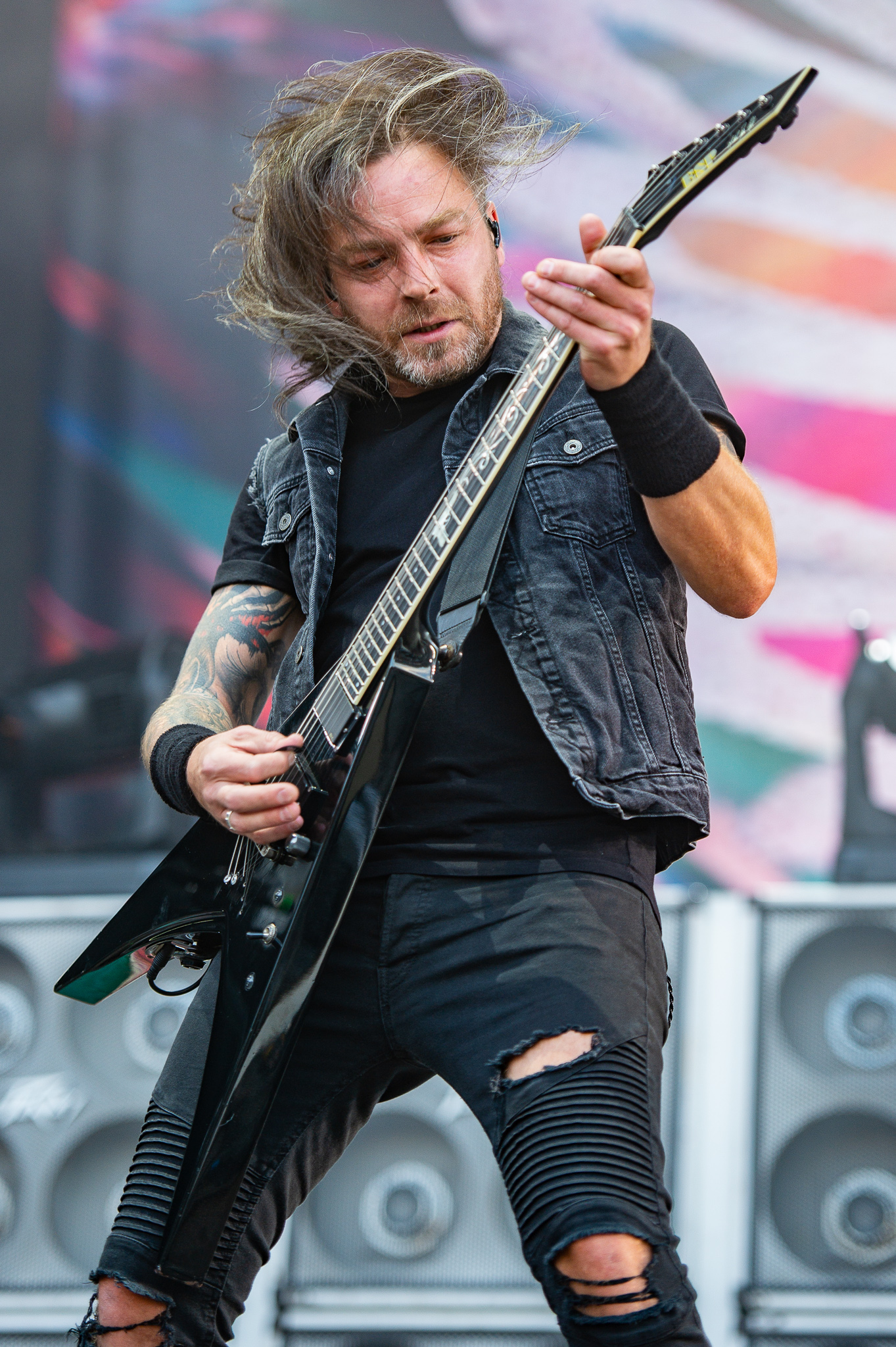 ARGO-Konzerte,Beck's Park Stage,Bullet for My Valentine,Festival,Konzert,Livekonzert,Livemusik,Michael Paget,Musik,RiP,Rock im Park 2018